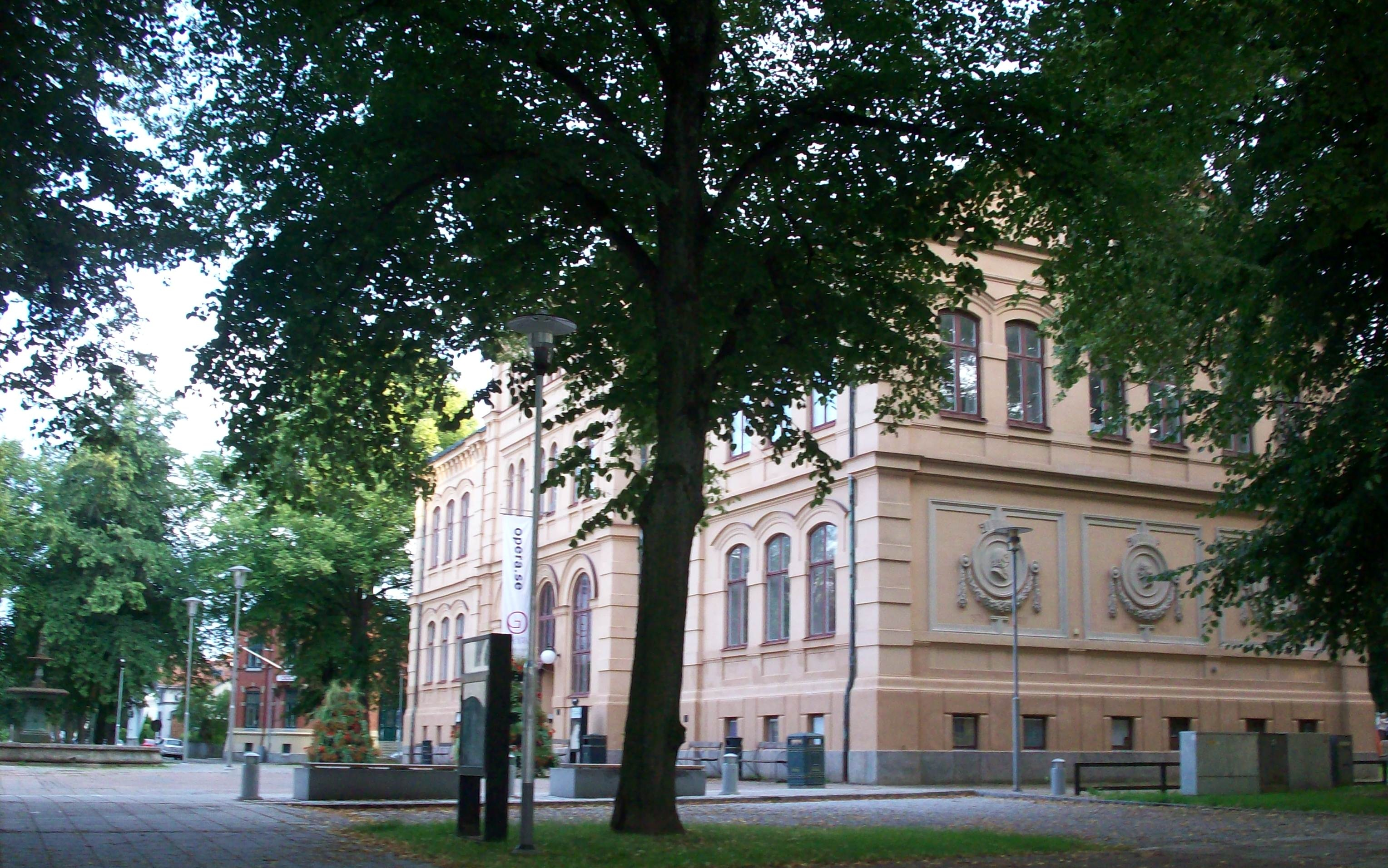 Eric Ugglas teater